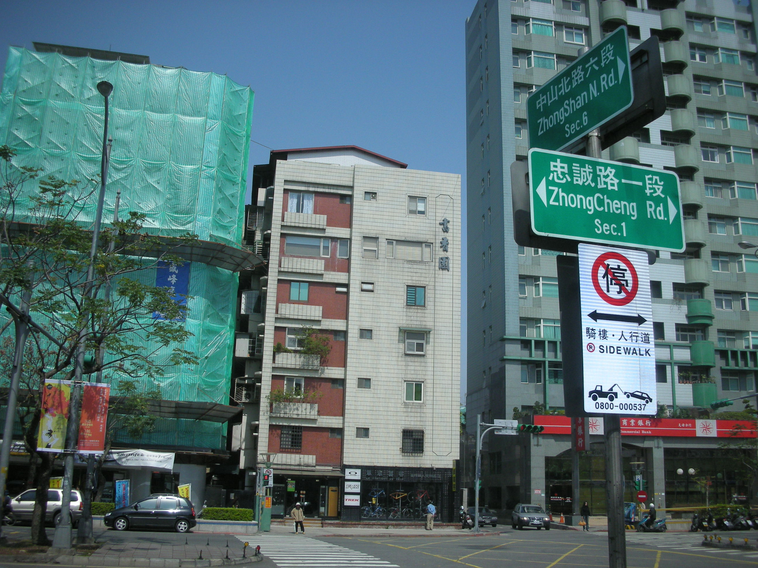 中文（台灣）: 臺北市士林區忠誠路一段與中山北路六段口。